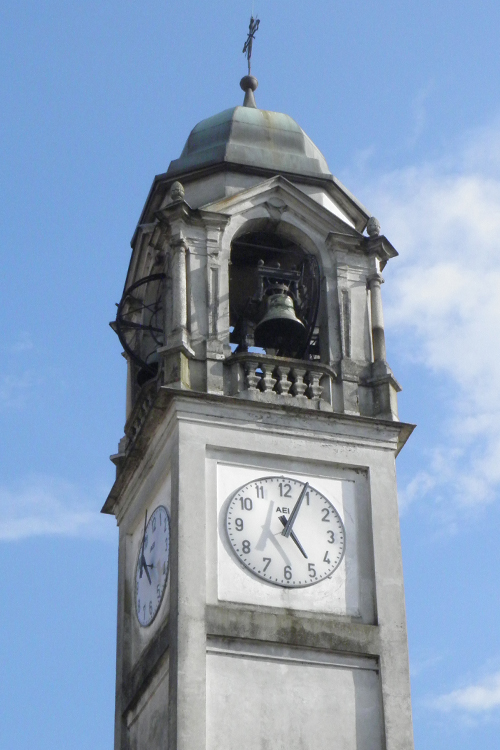 Il campanile di Rozzano (MI)